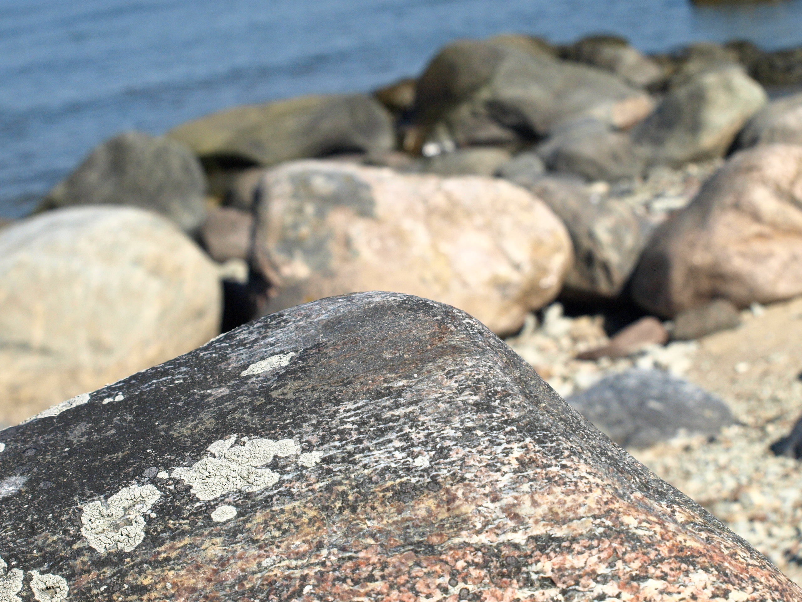 Kivid Põõsaspea neemel